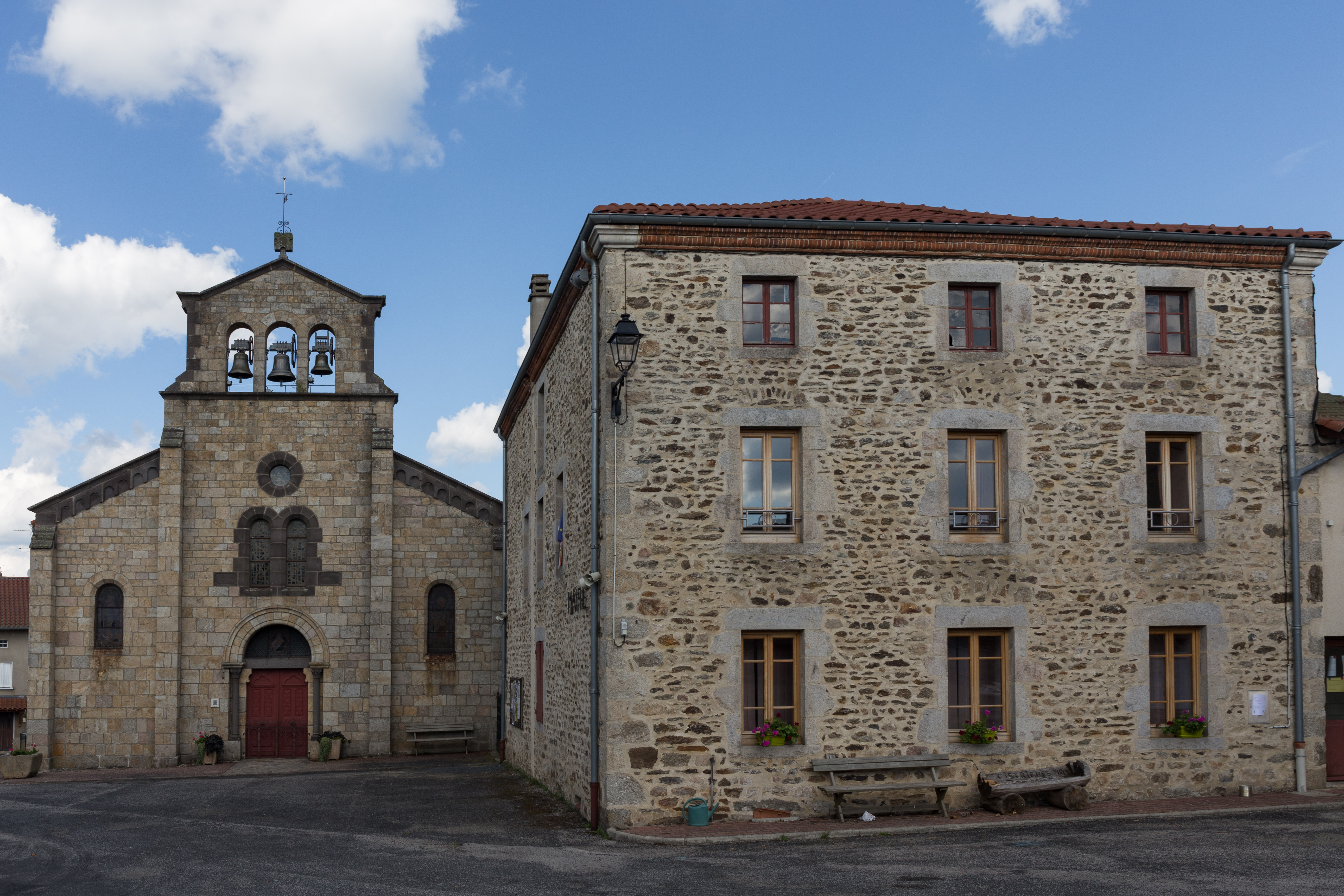 Mairie de Cistrières.